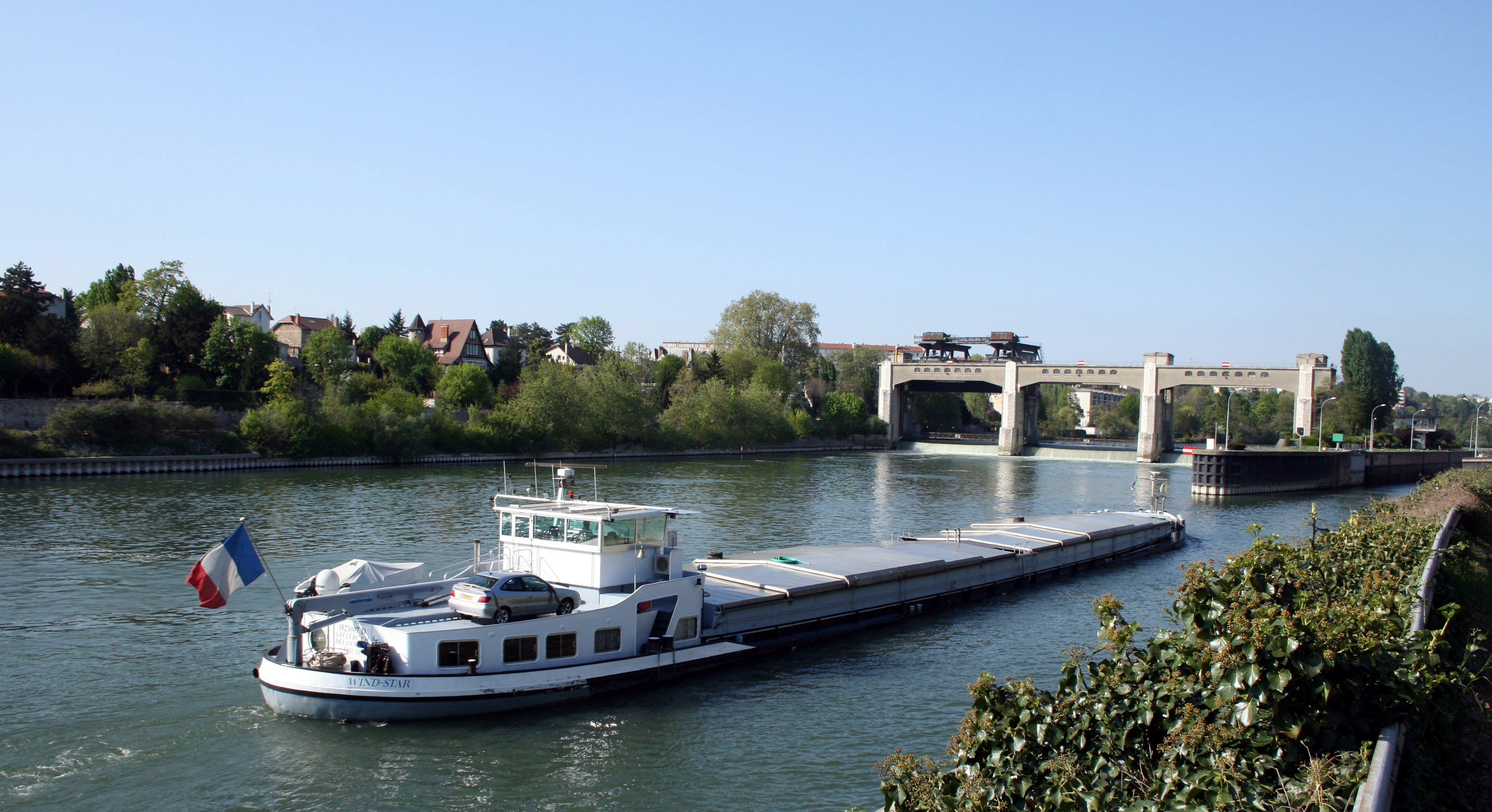 Wind-Star péniche entrant dans l'écluse de Chatou